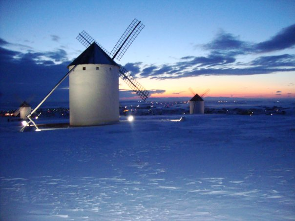 Vista del molino Burleta en un ocaso invenal.